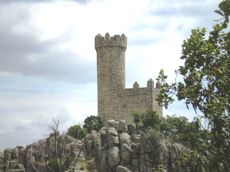 Atalaya de Torrelodones